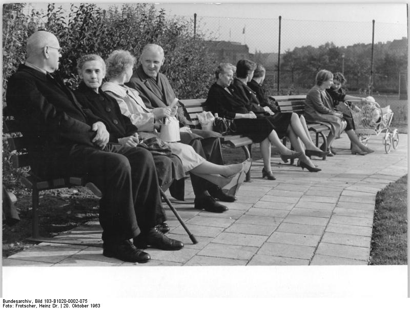 Zentralbild Frotscher 20.10.63 Volkswahl 1963 Der größte Teil der Berliner ist in den Vormittagsstunden seiner Wahlpflicht nachgekommen und beging den Tag der Wahlen am Nachmittag froh gestimmt auf Volksfesten und kulturellen Veranstaltungen. UBz: Einen erholsamen Nachmittag im schönen Sonnenschein am Wahltag machten sich das Rentner-Ehepaar Auguste und Paul Krüger (Vordergrund) in der Parkanlage auf dem Nordmarkplatz im Bezirk Prenzlauer Berg.